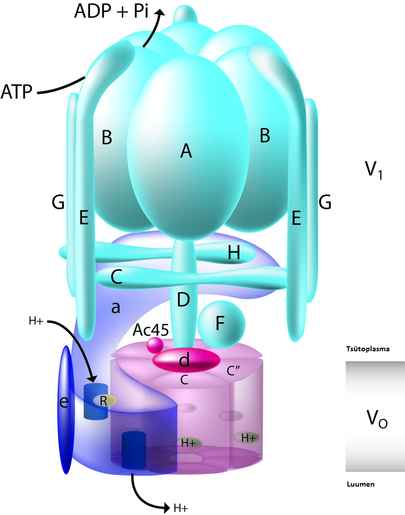 V-ATPaas